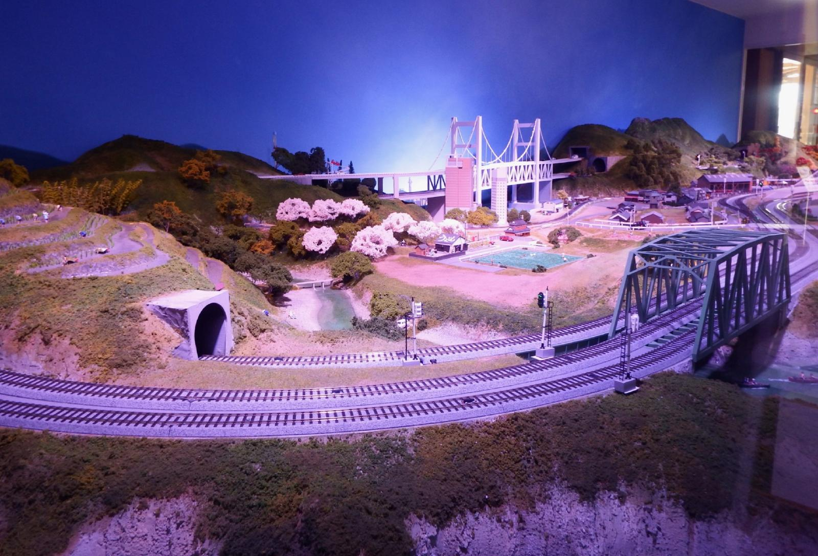 四国鉄道文化舘のジオラマ